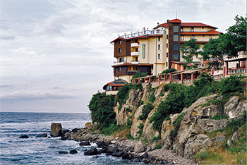 Созопол, Черно море, България; 2006 Пламен Ташев